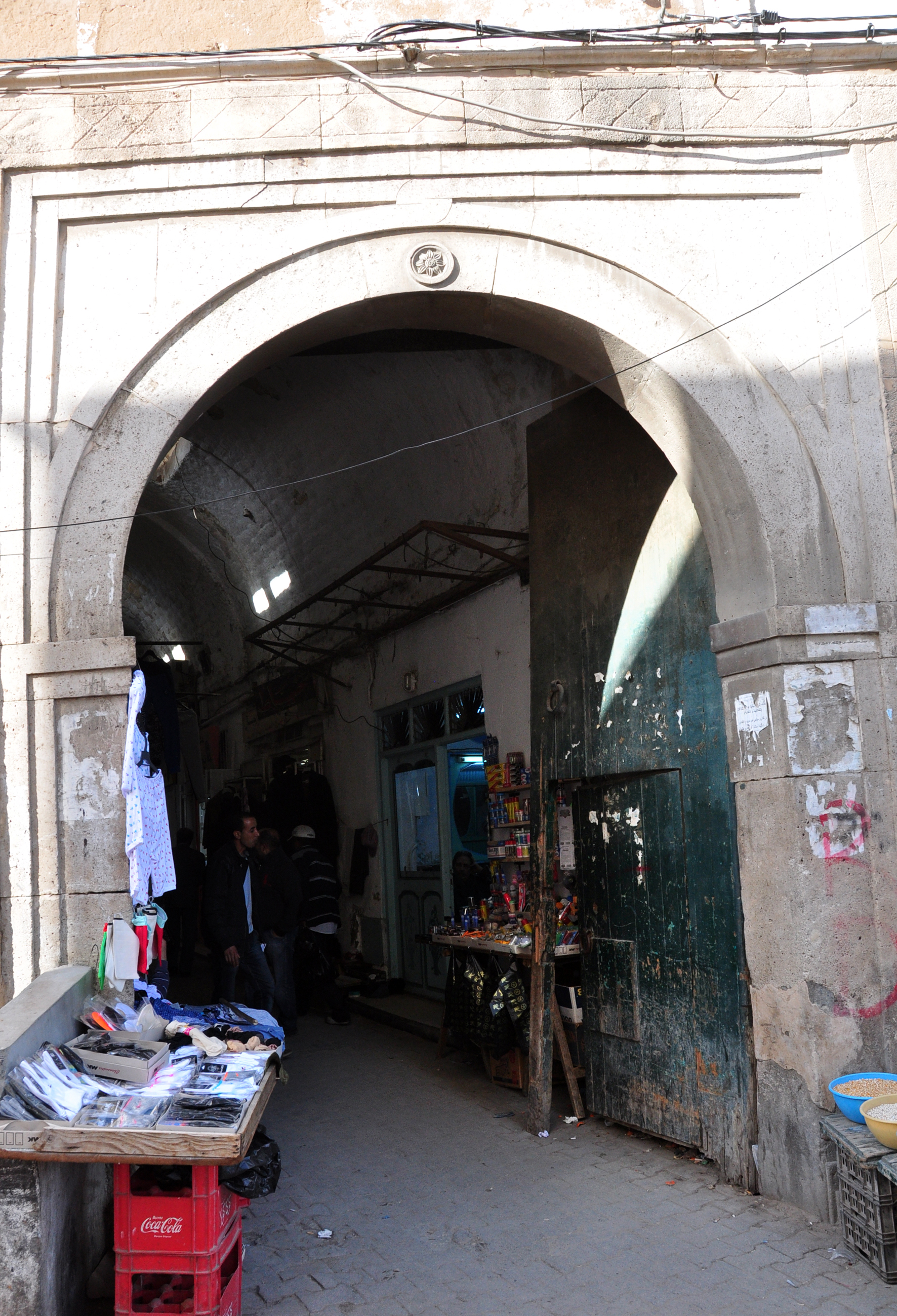 Souk El-Djedid